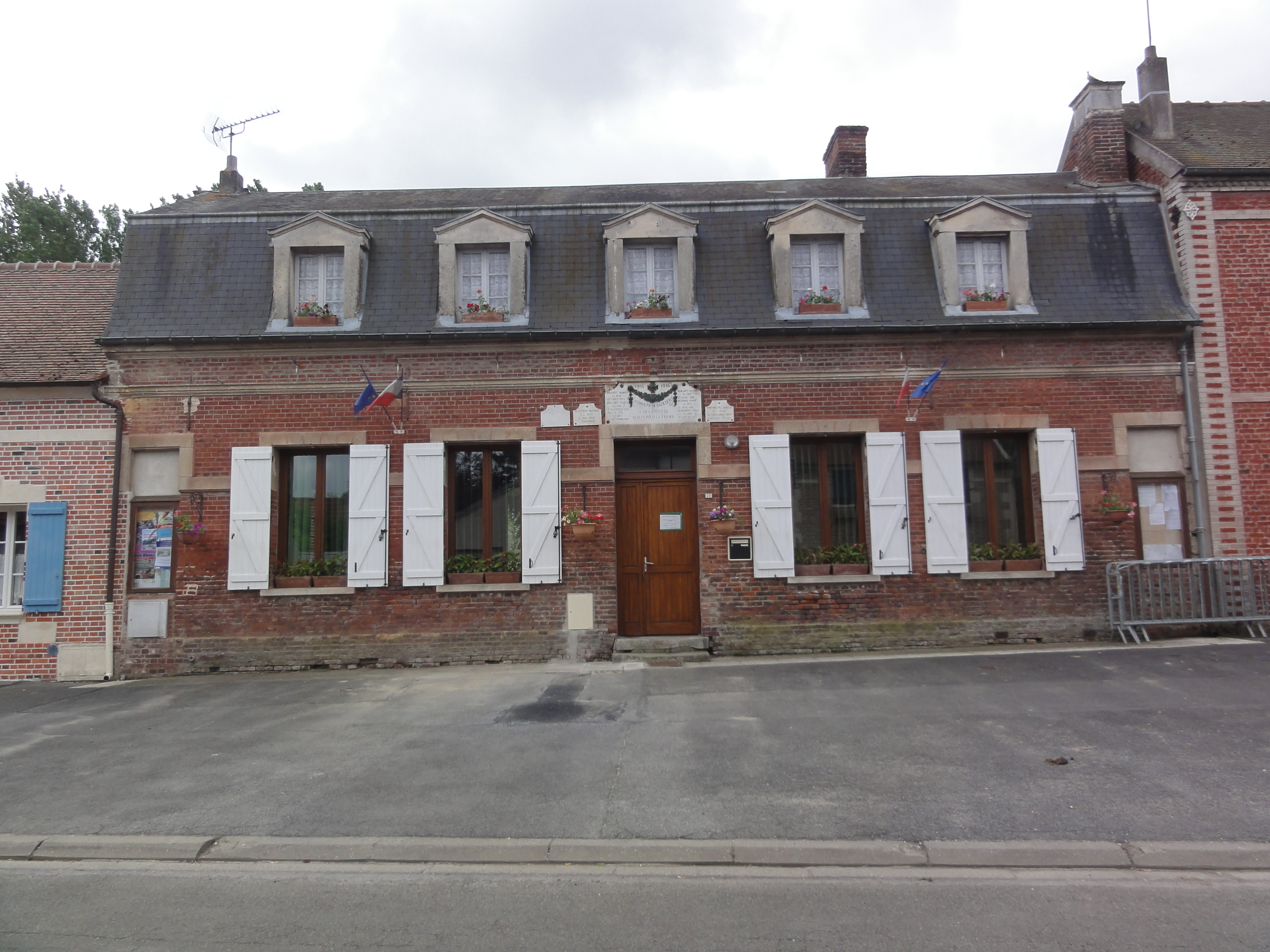 Bazicourt (Oise) Mairie